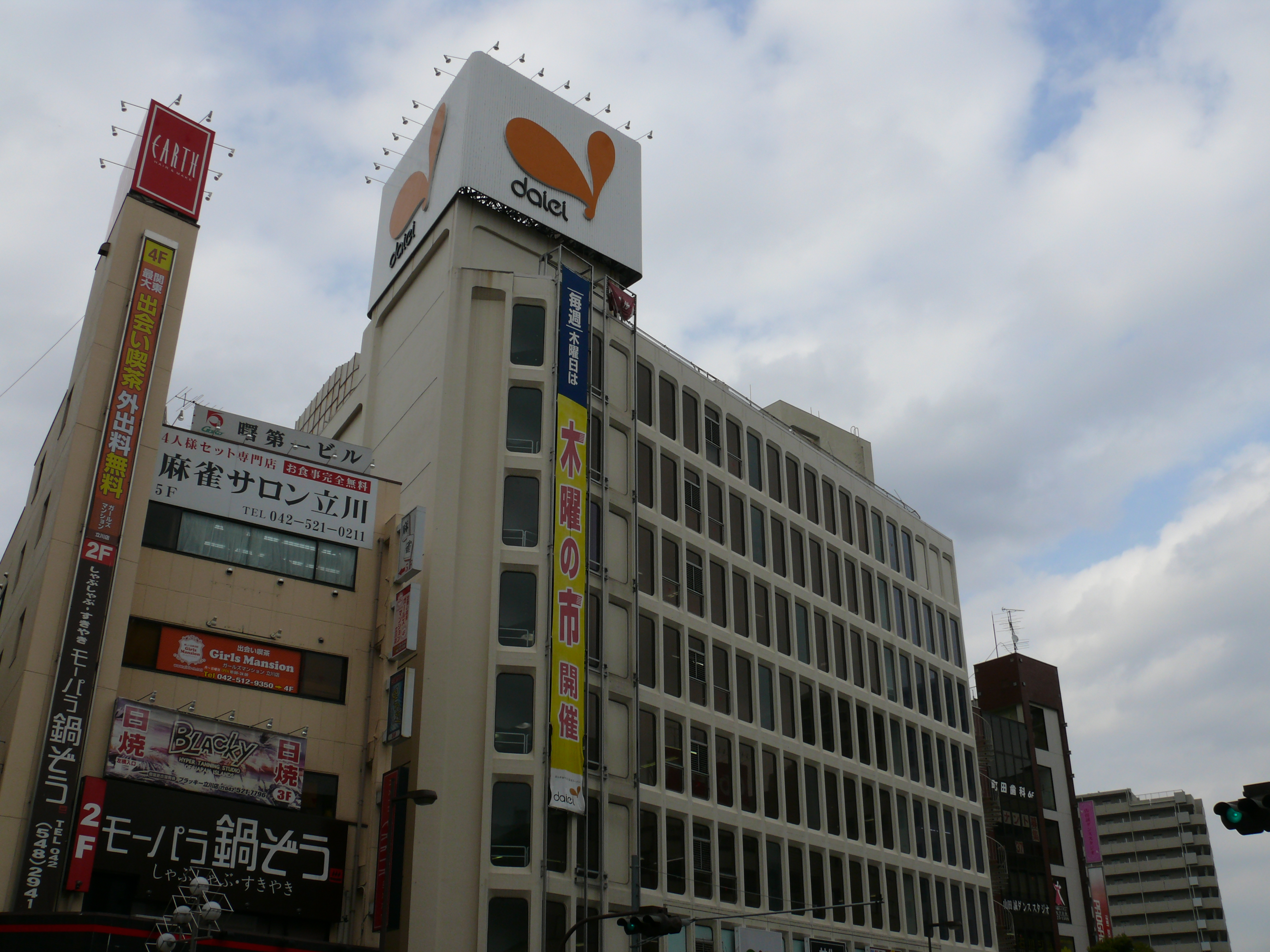 ダイエー立川店